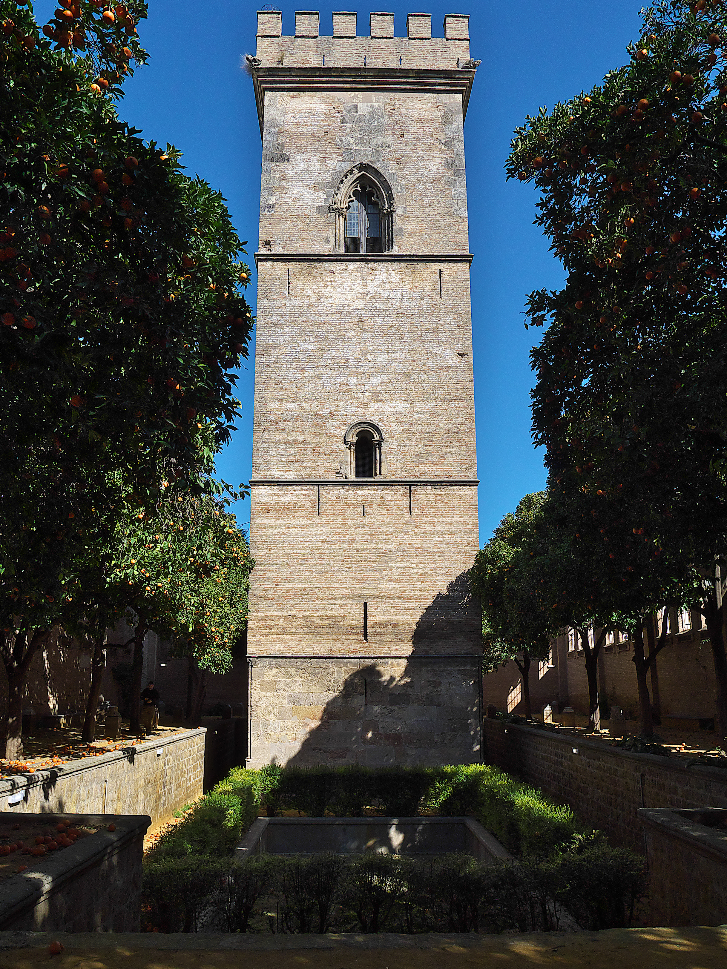 Torre del palacio del infante don Fadrique de Castilla (1223-1277), es junto a las Atarazanas Reales de Sevilla y el Palacio Gótico de los Reales Alcázares de Sevilla el monumento más antiguo de la ciudad. Se descarta una función defensiva, y posiblemente el diseño es de un arquitecto siciliano